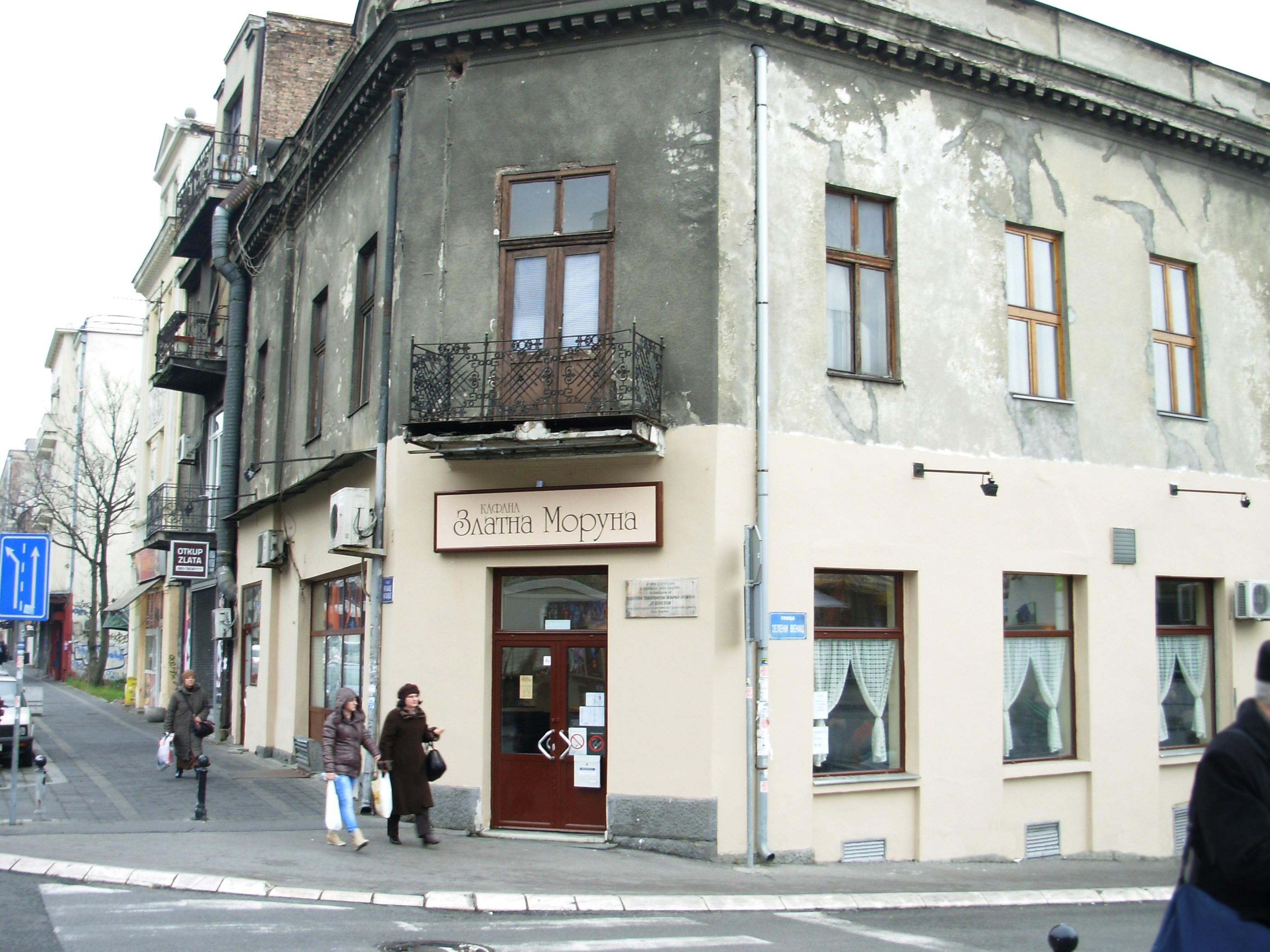 "Zlatna Moruna" - kafana na "Zelemom vencu" - Beograd, gde je Gavrilo Princip često zalazio. Slikao Goldfinger